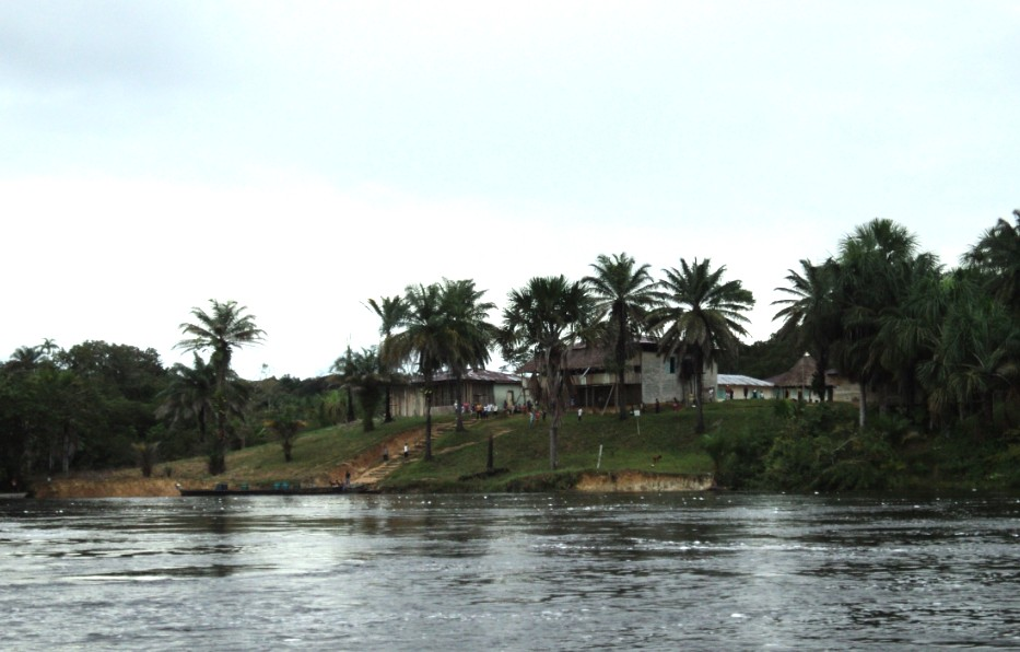 Internado Indígena en la cabecera de Mirití-Paraná, corregimiento departamental de Amazonas, Colombia.